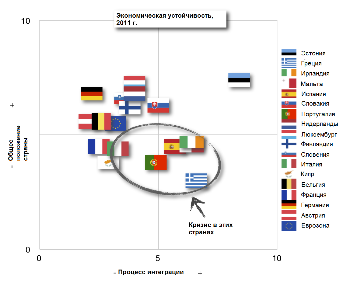 Общая экономическая устойчивость и показатели интеграции стран еврозоны за 2011 г. по даннным «Евро плюс монитор». 0 соответствует худшему значению, 10 - лучшему. Источник